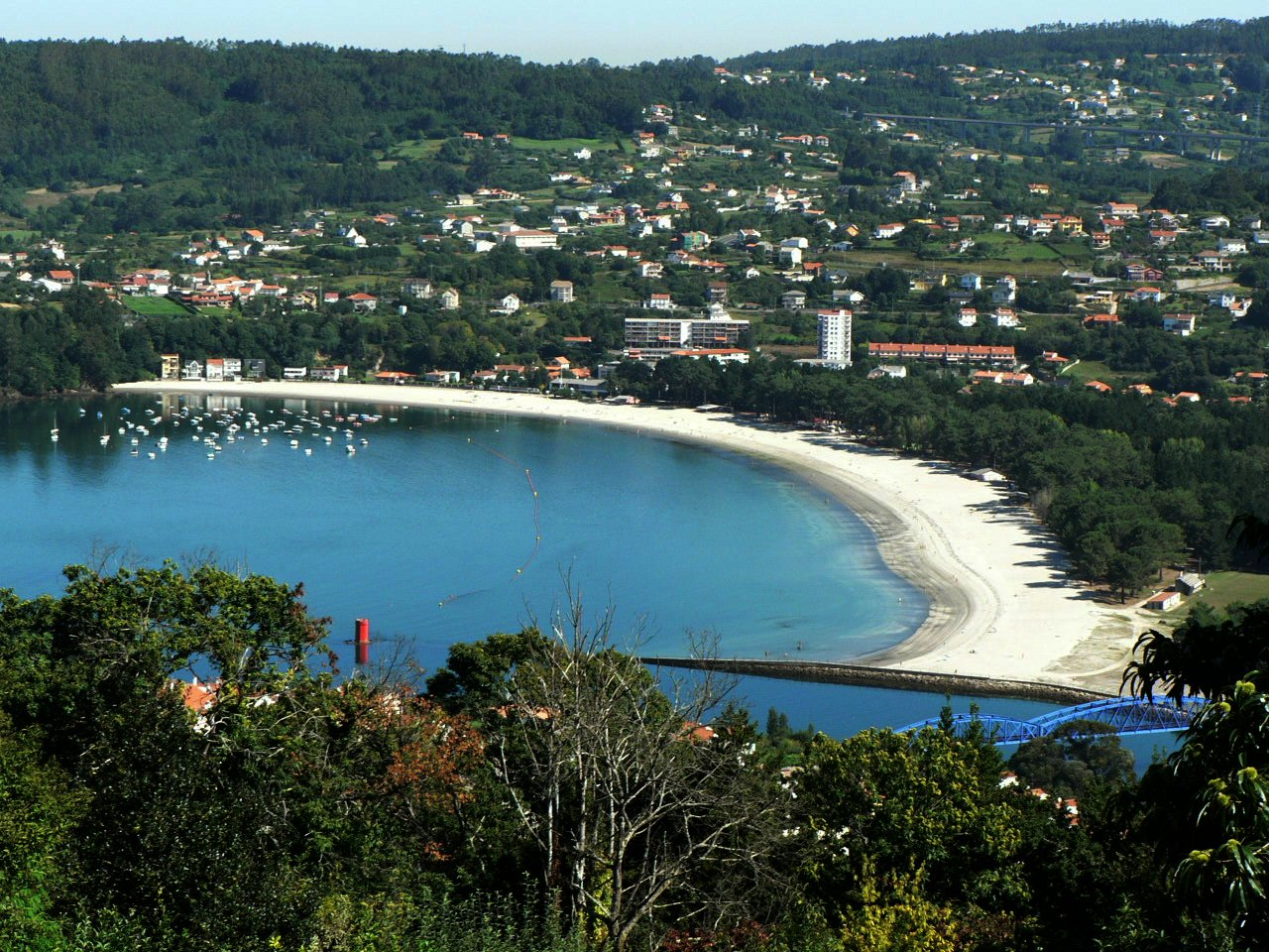 Vista xeral da praia de Cabanas (Pontedeume)